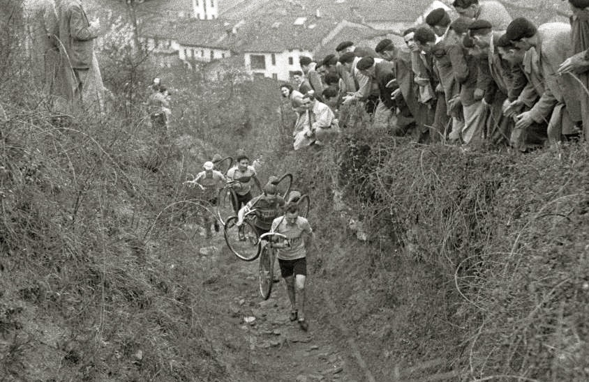 Título original: Campeonato de España de ciclocross celebrado en la localidad de Oñati (19/20) Localización: Oñate (Guipúzcoa)